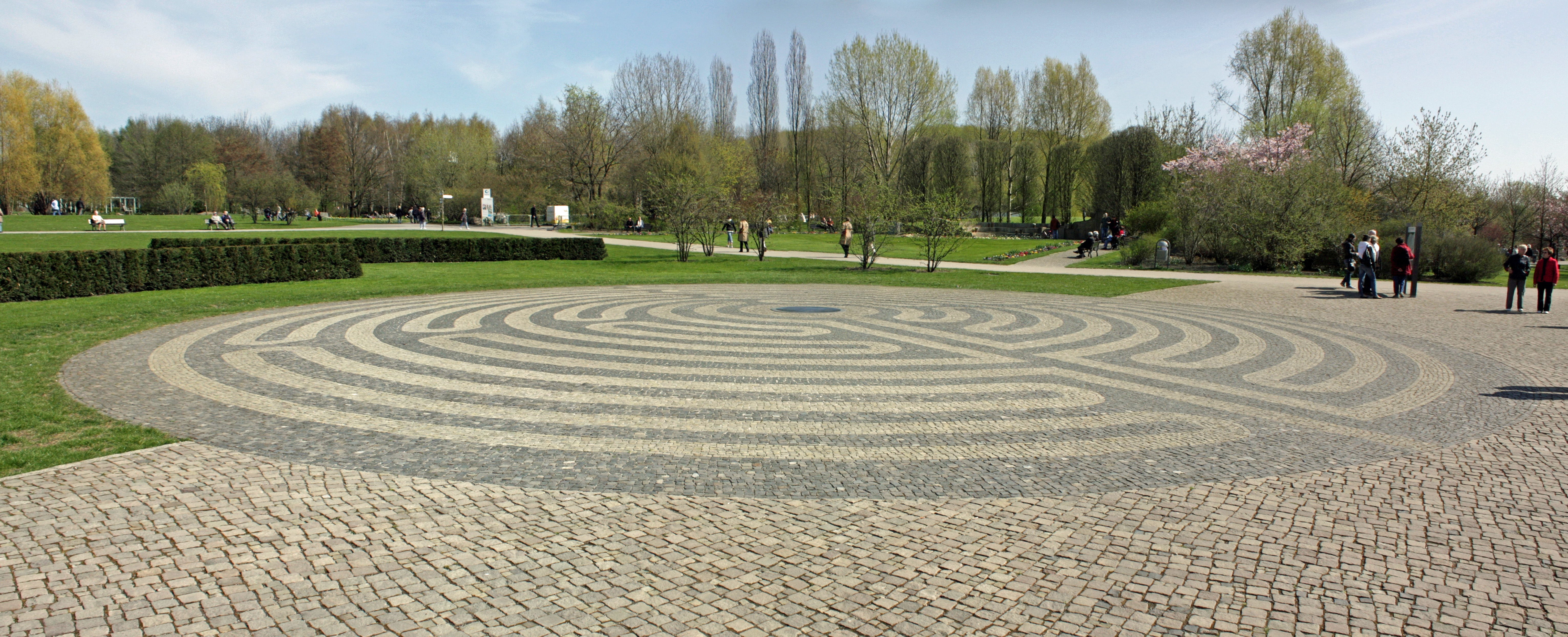 Pflasterlabyrinth im Erholungspark Marzahn